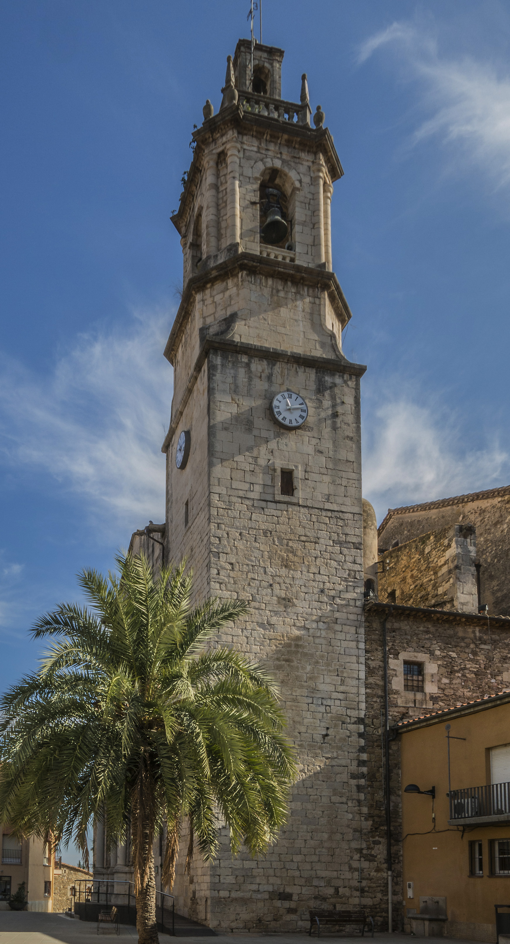 Celrà és un municipi del nord-est de Catalunya al nord-est comarca del Gironès.